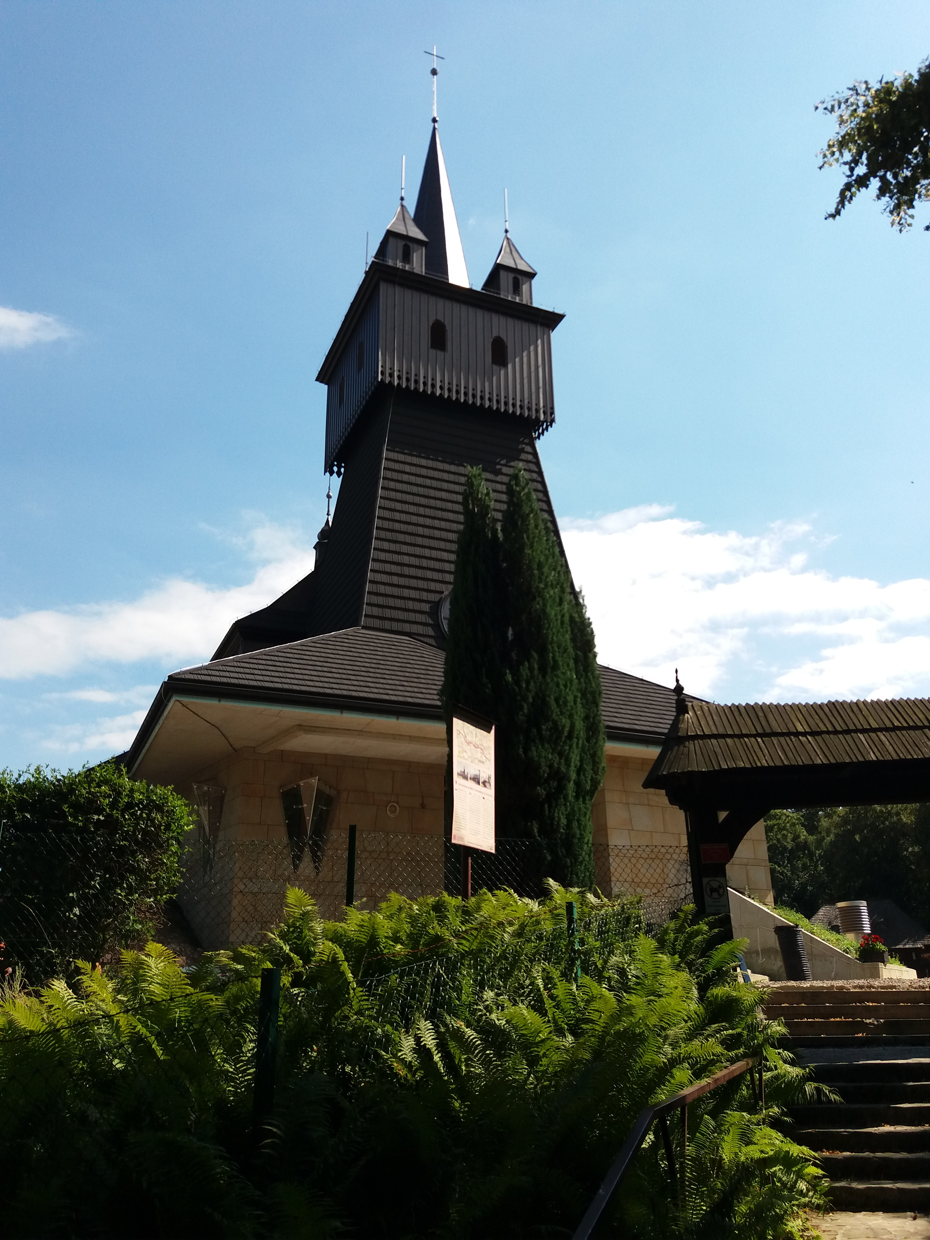 Kościół Matki Bożej Królowej Polski w Krakowie-Woli Justowskiej